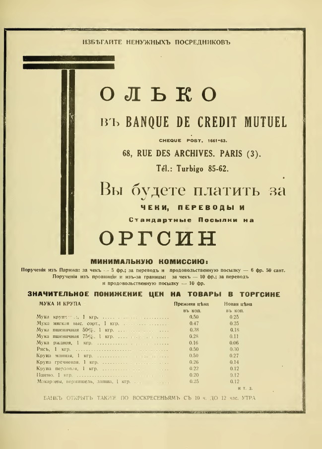 Реклама банка Banque de Credit Mutuel. Переводы и посылки на Торгсин.